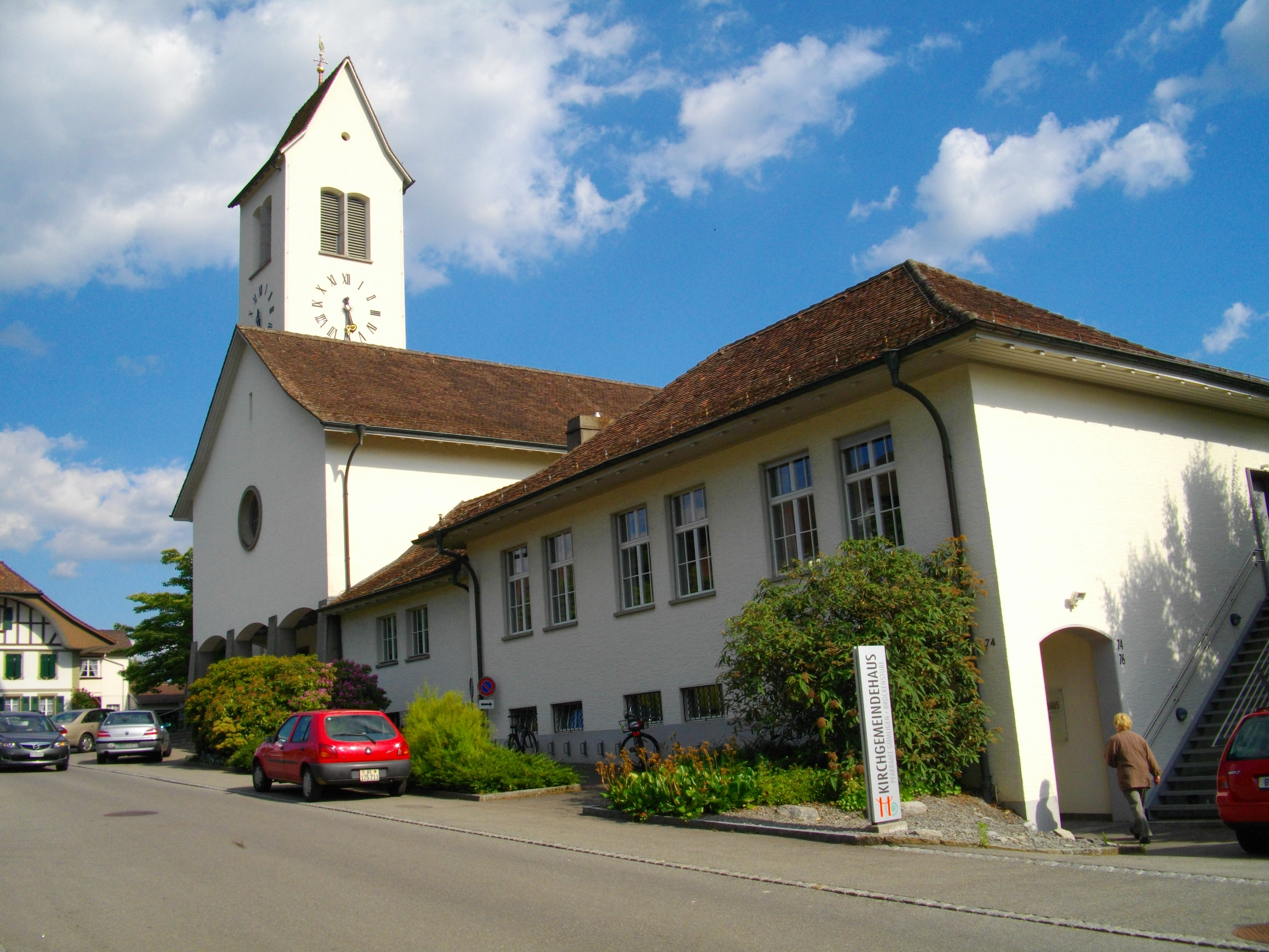 Iglesia de Gümligen